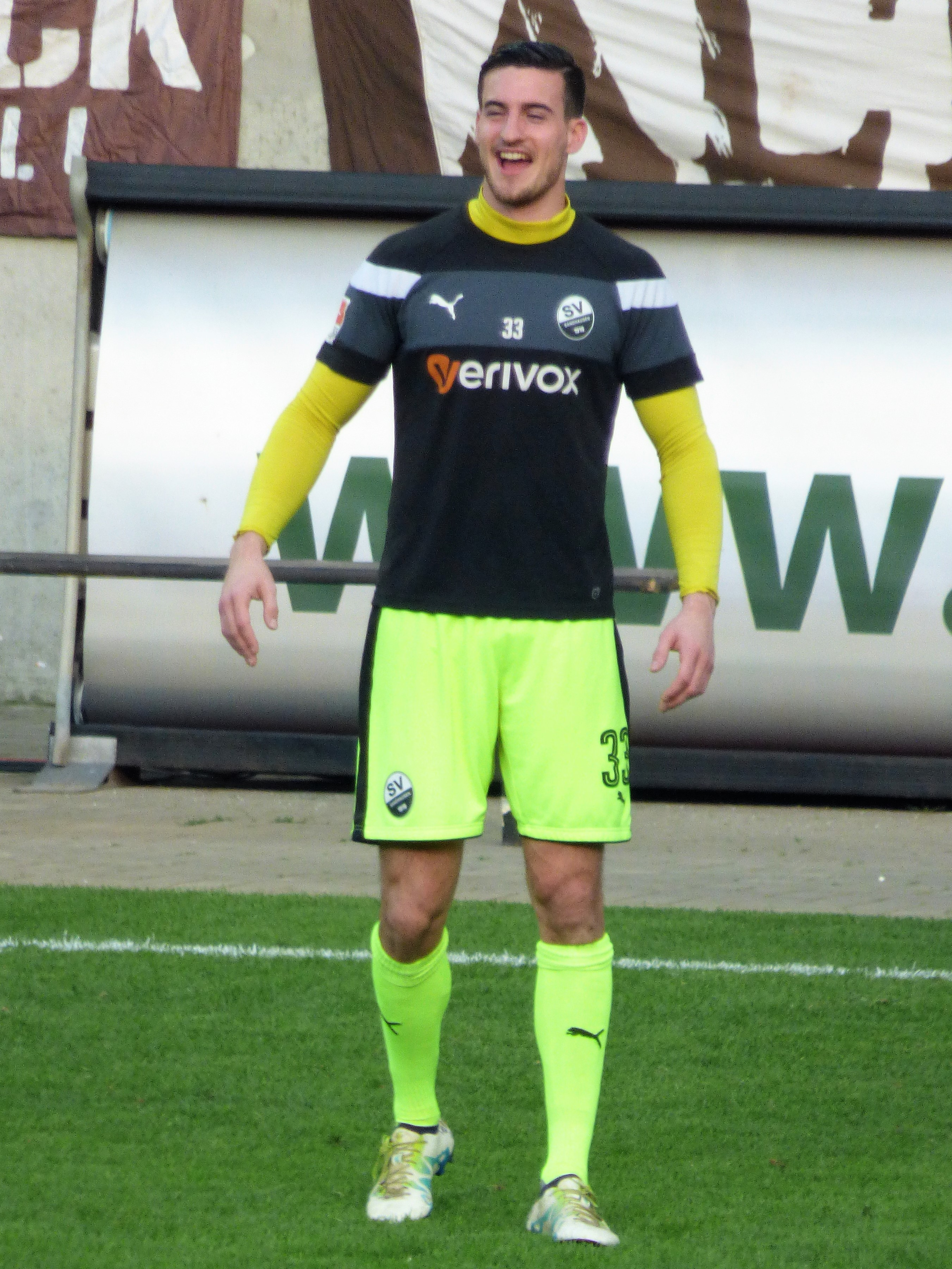 Rick Wulle 2017